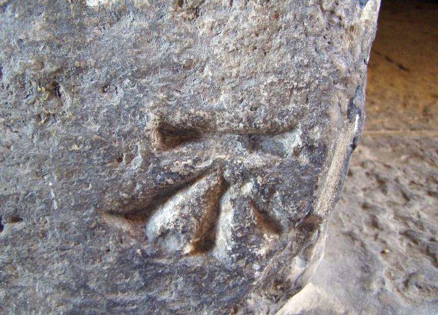 נקודת ייחוס של וילסון רישיון נוצר על ידי משתמש:Ranbar